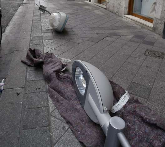 Cambio de farolas por unas que consumen menos, un 45 % menos de gasto. [1]